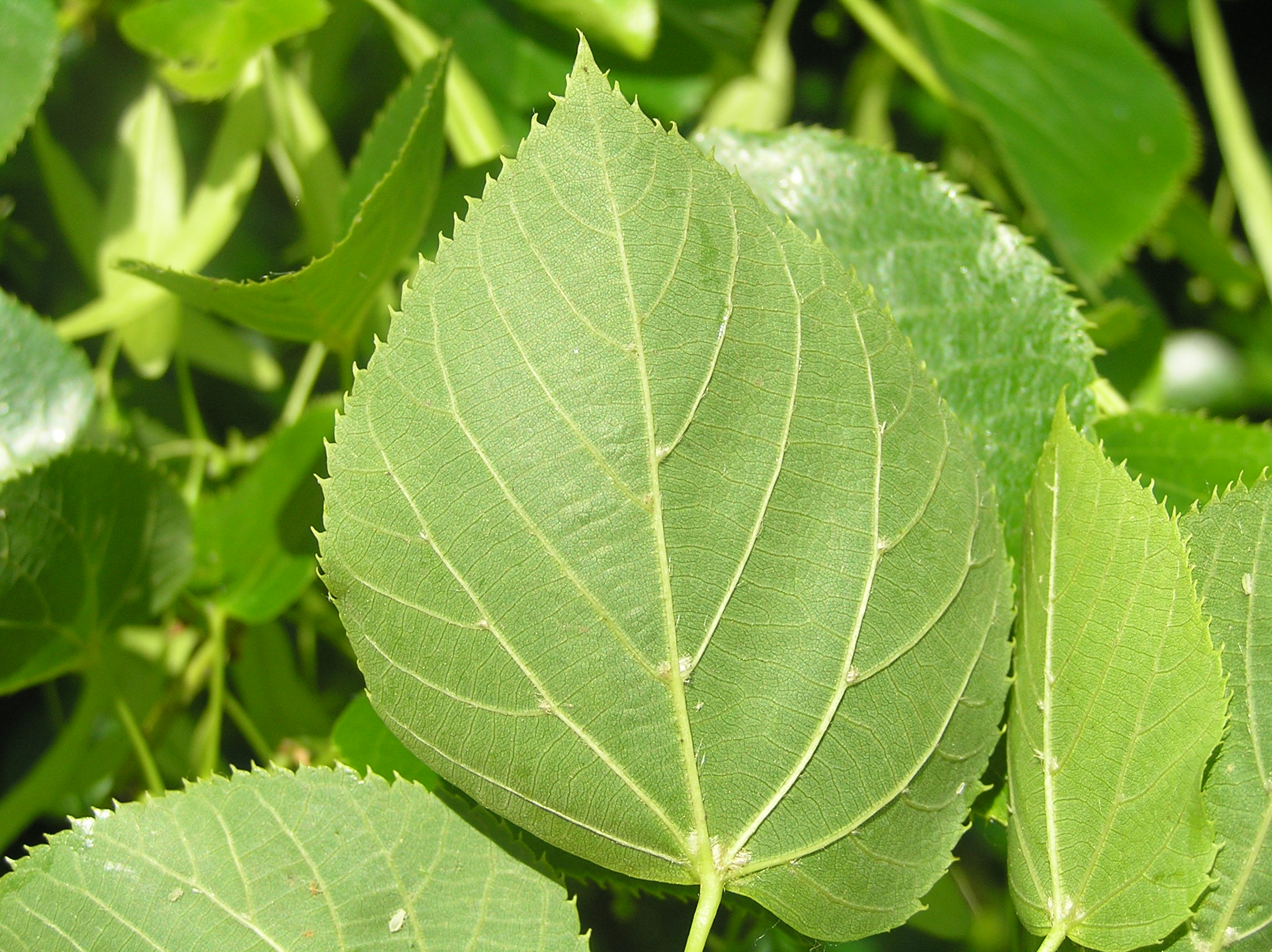 Tilia × euchlora, cultivated in Lipník nad Bečvou, Czech Republic